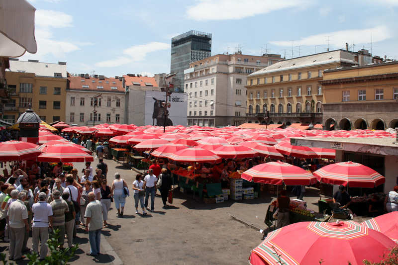 zagrebački Dolac